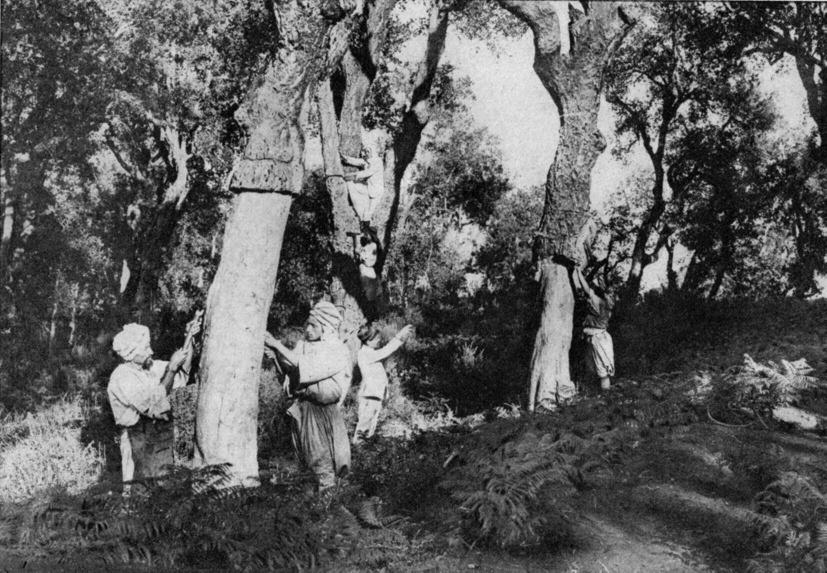 Exploitation du liège durant l’époque française Extrait de l’ouvrage de Marc H.,1930 : Notes sur les forêts de l’Algérie. Collection du Centenaire de l’Algérie. Larose, Paris